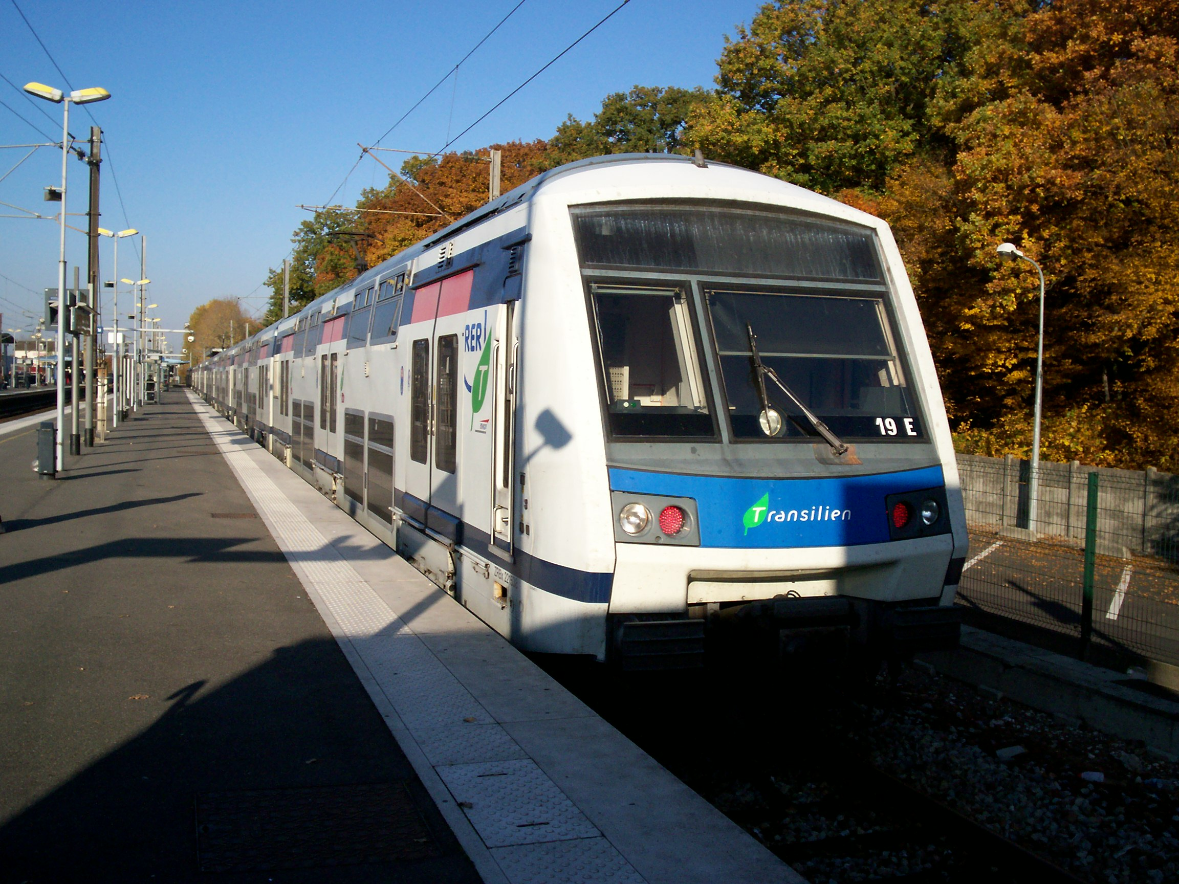 Rame vide à Émerainville - Pontault-Combault, en attente d'une mission HURE (= HORE), actuels HAVA.